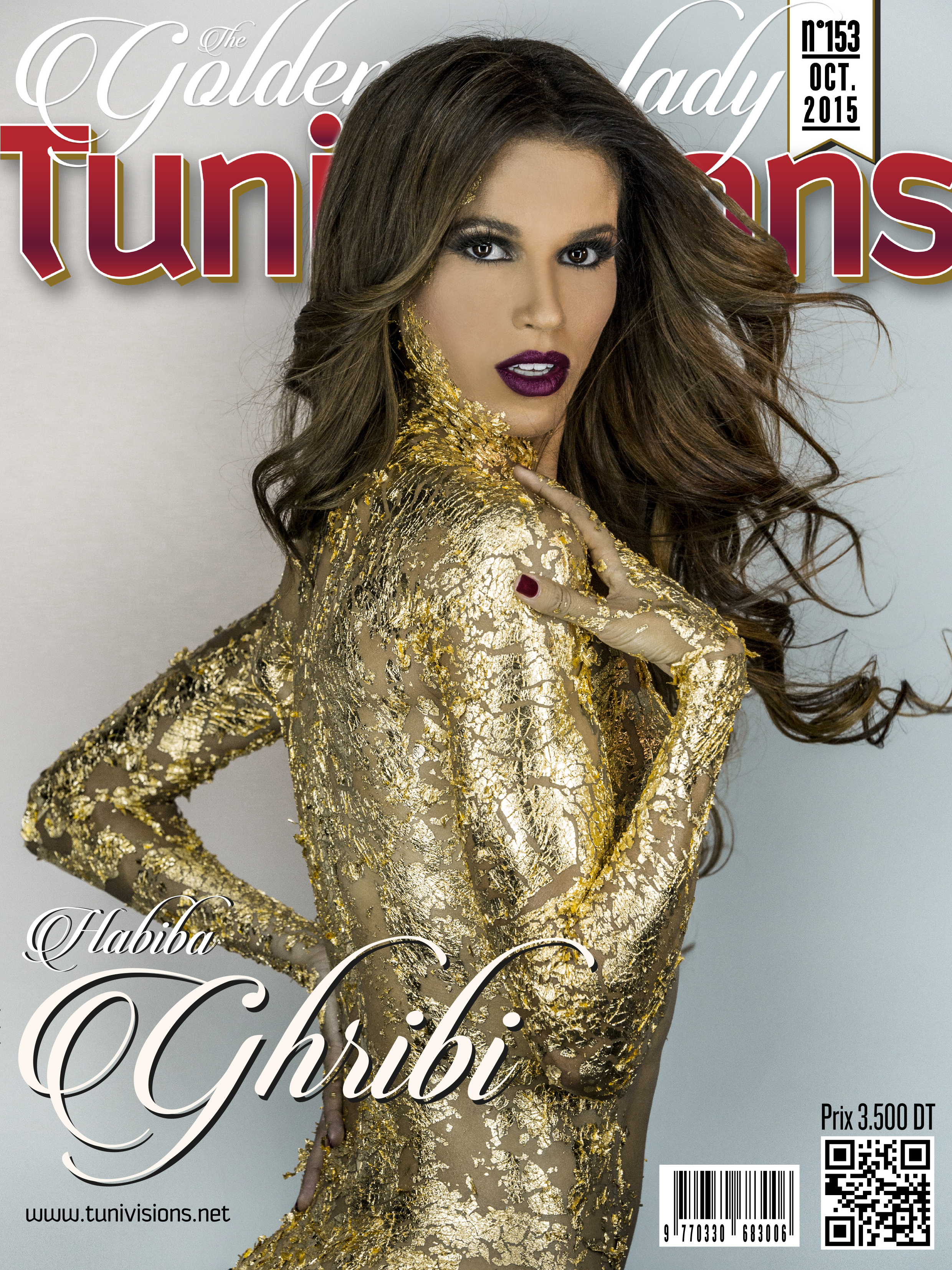 Couverture du numéro 153 du magazine tunisien Tunivisions.